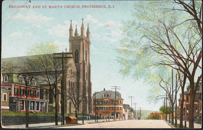 Église Sainte-Marie de Providence (Rhode Island), carte postale ancienne 1910.